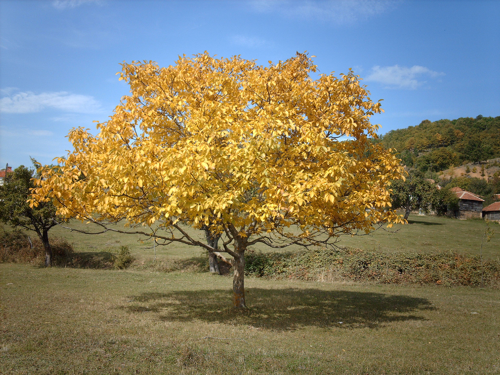 Persian Walnut tree, Desivojca, Kosovo